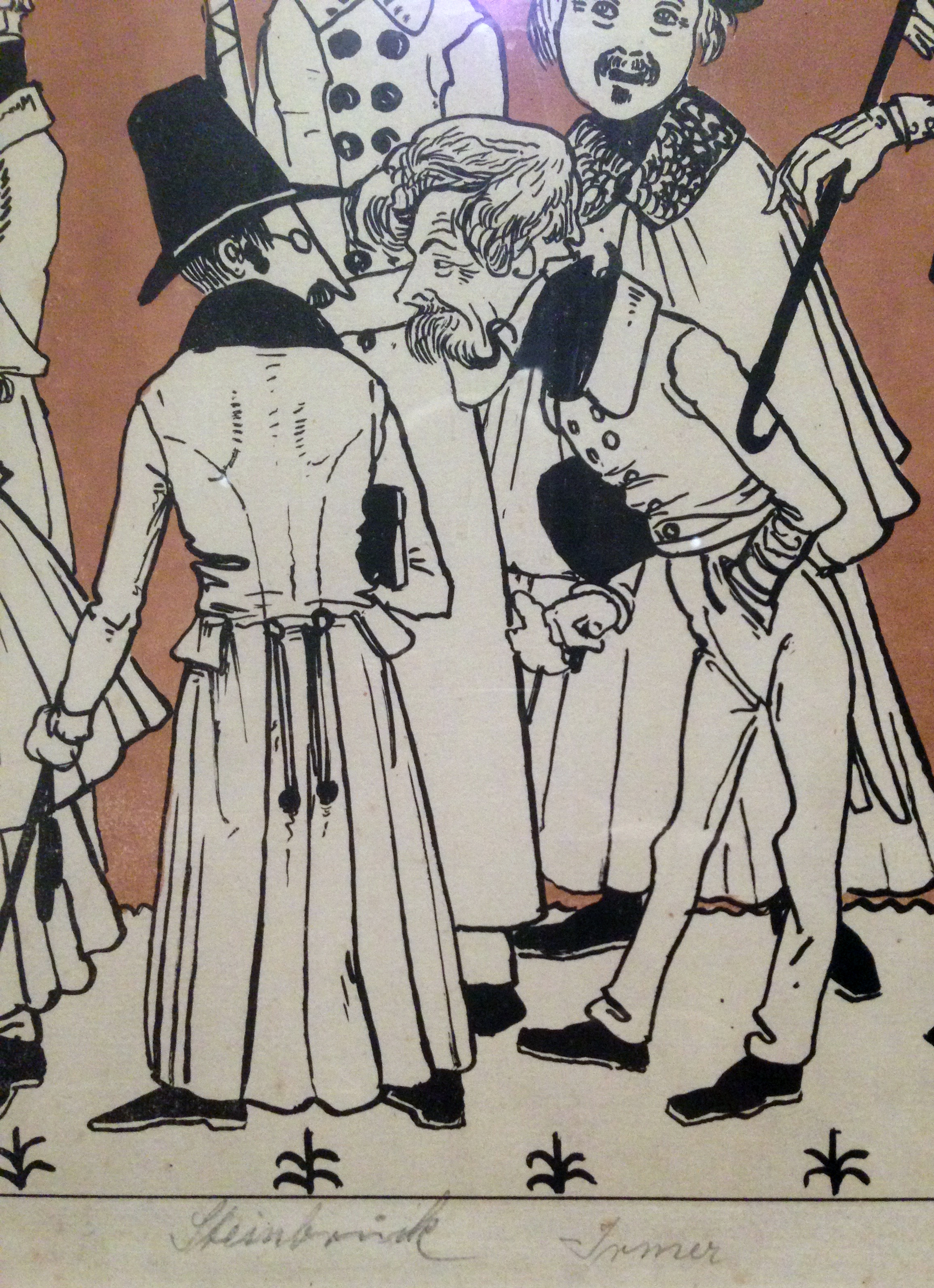 "Zug der Düsseldorfer Künstler" von 1837, Karikatur seiner malenden Zeitgenossen II, Andreas Achenbach – Ausschnitt Eduard Steinbrück Rückseitig im Mantel mit Hut